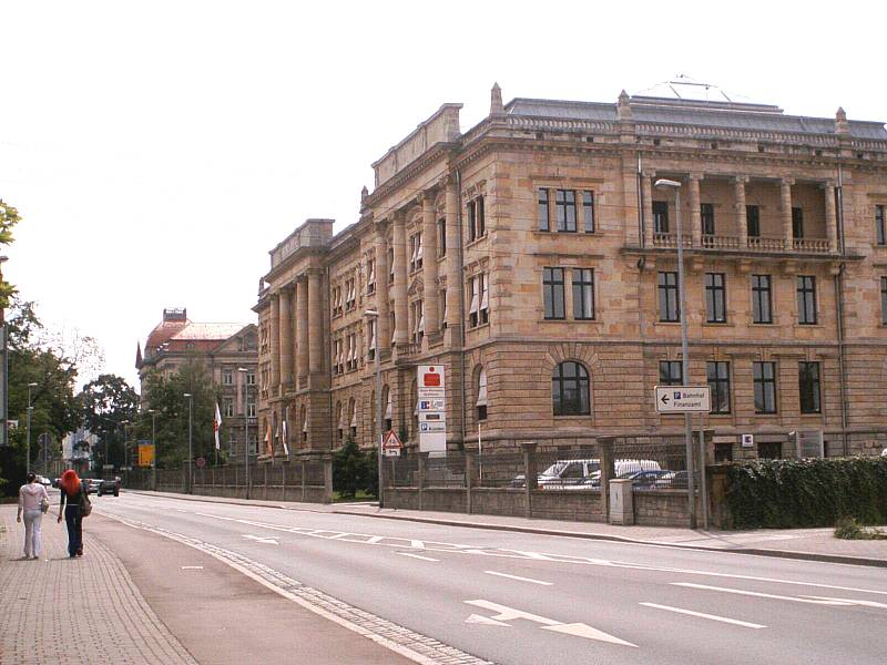 Bankgebäude in der Leipziger Str.